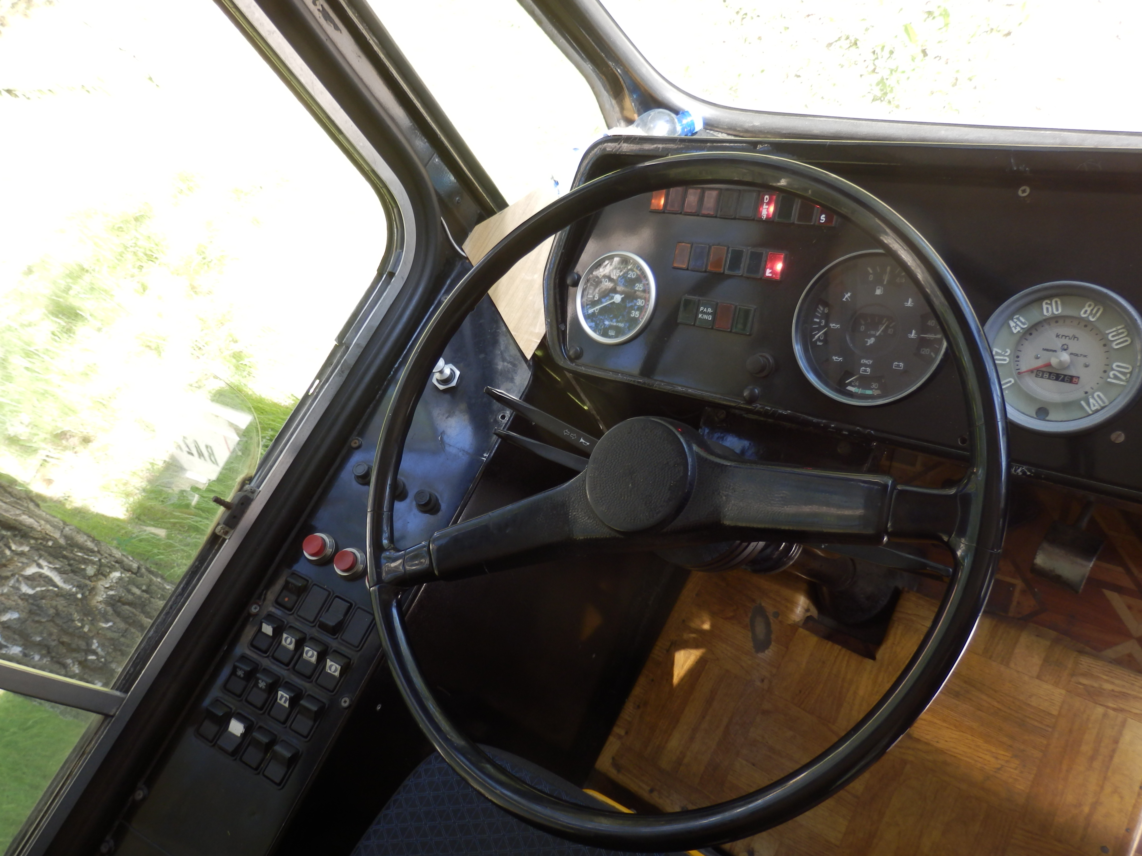 Deska rozdzielcza kierowcy w autobusie Jelcz PR110M z 1986 roku.